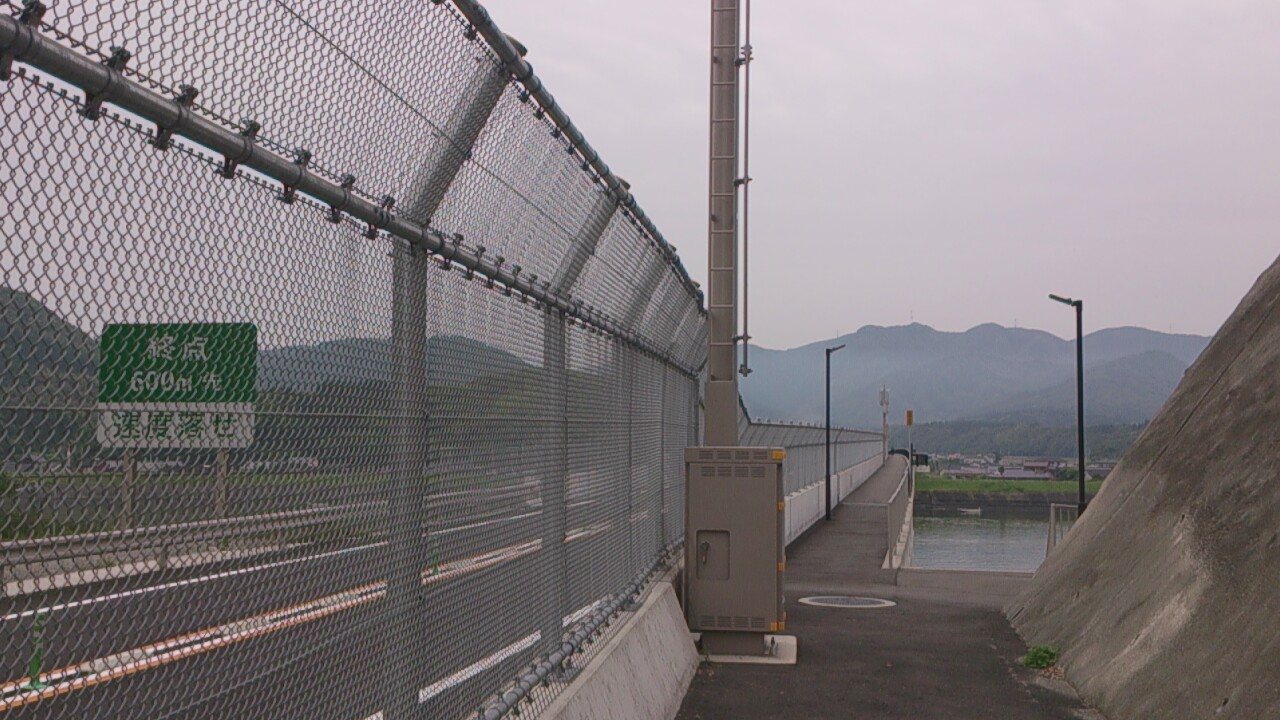 南九州西回り自動車道に付帯する歩道